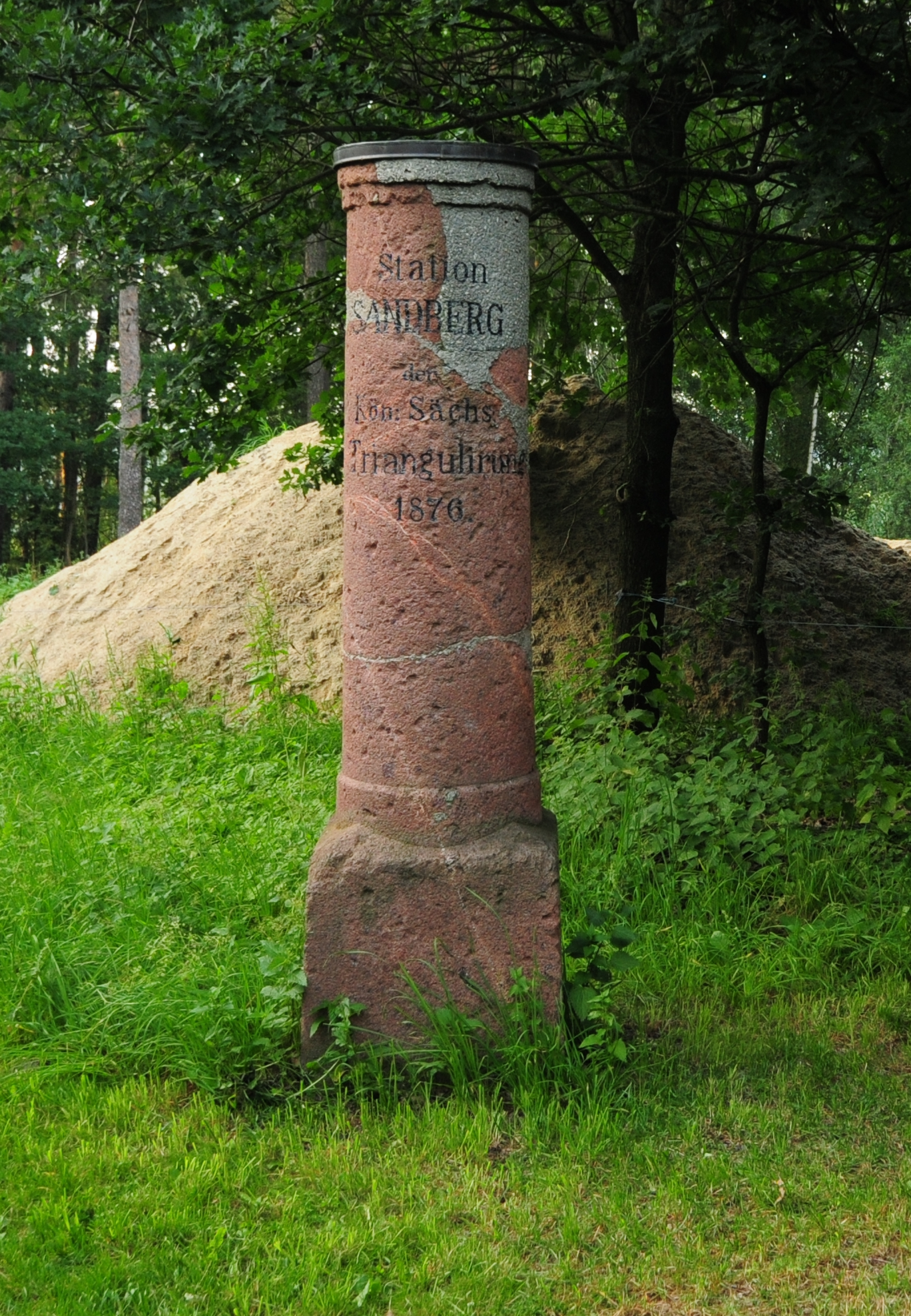 Thierbach, historischer Vermessungspunkt (Vogtlandkreis, Sachsen, Deutschland) Trigonometrischer Punkt 2. Ordnung Nr. 155 der Königlich-Sächsischen Triangulirung westlich von Pausa auf dem Sandberg (546,3 m)